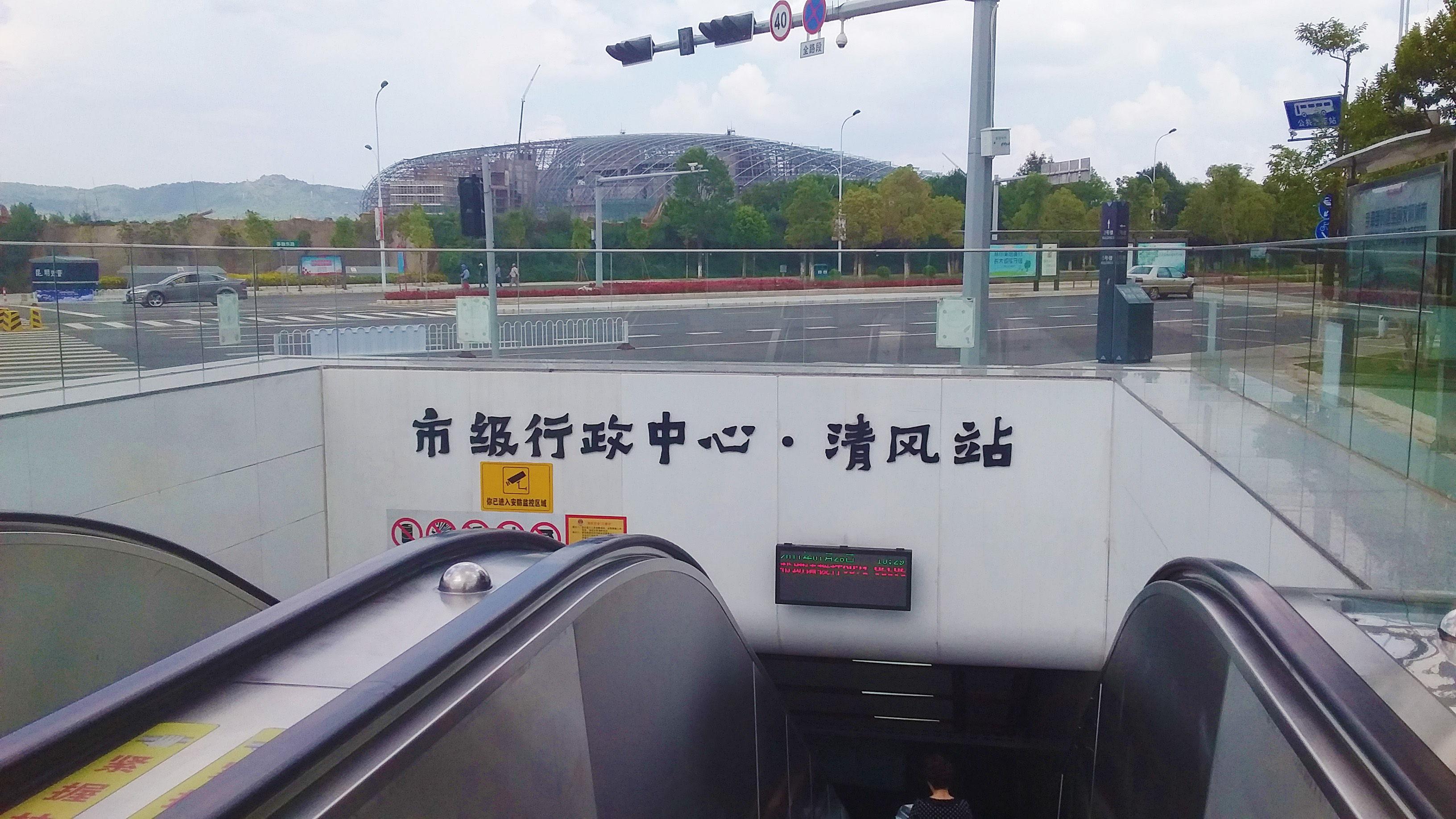 昆明地铁一号线支线市级行政中心清风站A出入口